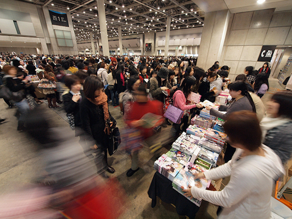 Convention Comic City Comic City copyright